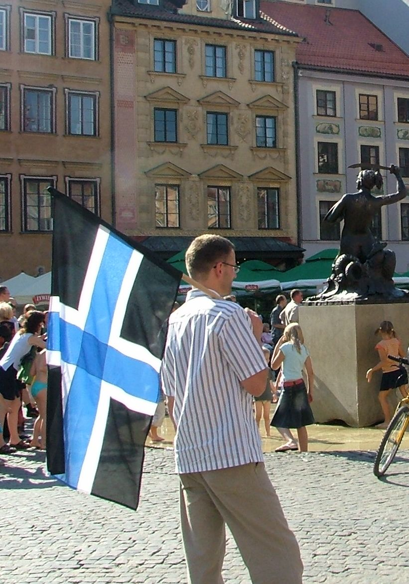 Platforma Janusza Korwin-Mikke, wybory 2005